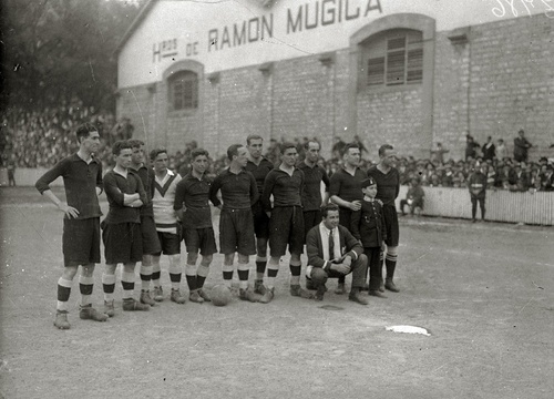 ESCENAS DE LA FINAL DE CAMPEONATO DE ESPAÑA EN EL CAMPO DE ATOTXA ENTRE LOS EQUIPOS DEL REAL UNION Y REAL MADRID (1-0). (Foto 10/18) (Real Union team: Eguiazabal, Gamborena, Berges, Emery, Matias, Echeveste, Anatol, Errazquin, Vazquez, Azurza, Petit)